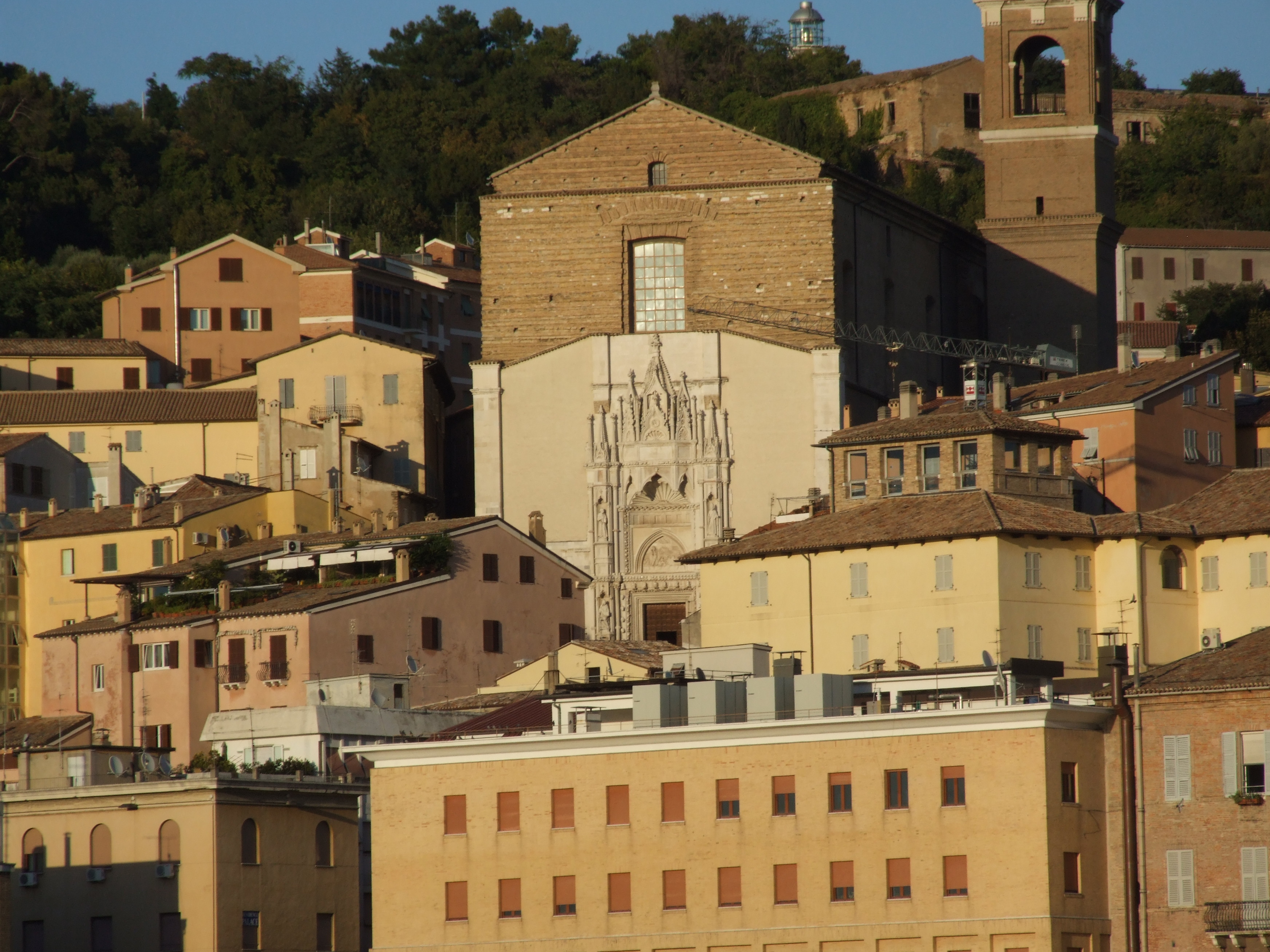 Convento di San Francesco alle Scale - la chiesa vista dal porto This is a photo of a monument which is part of cultural heritage of Italy.